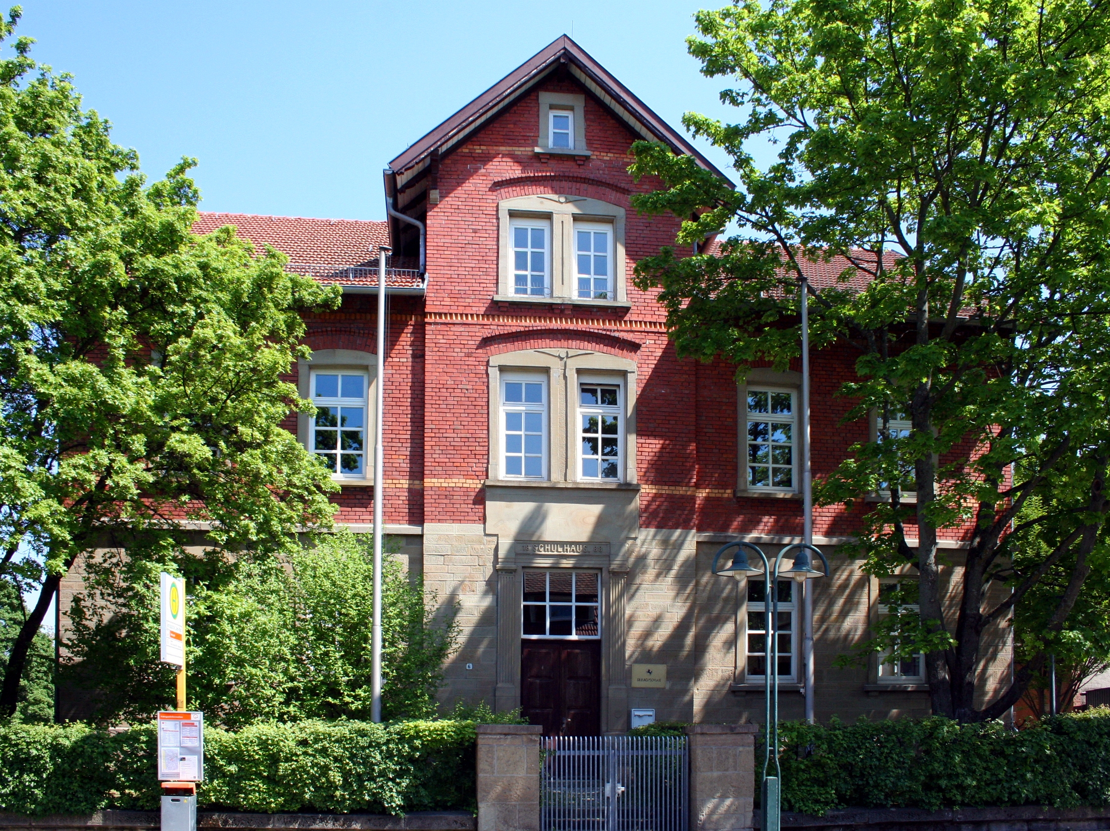 Seelachschule in Stuttgart-Weilimdorf, Baden-Württemberg